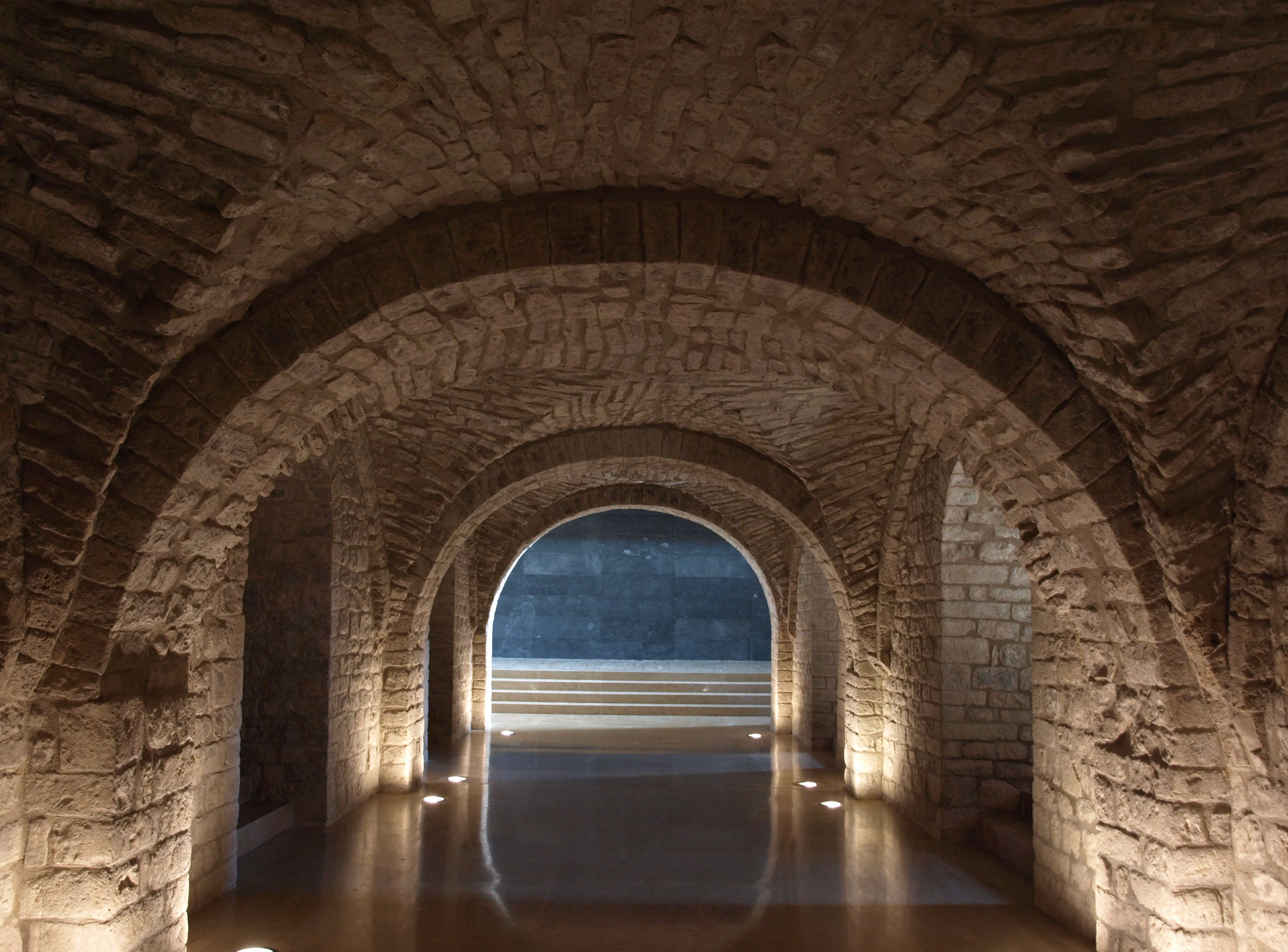 Monestir de Sant Llorenç prop Bagà - Cripta